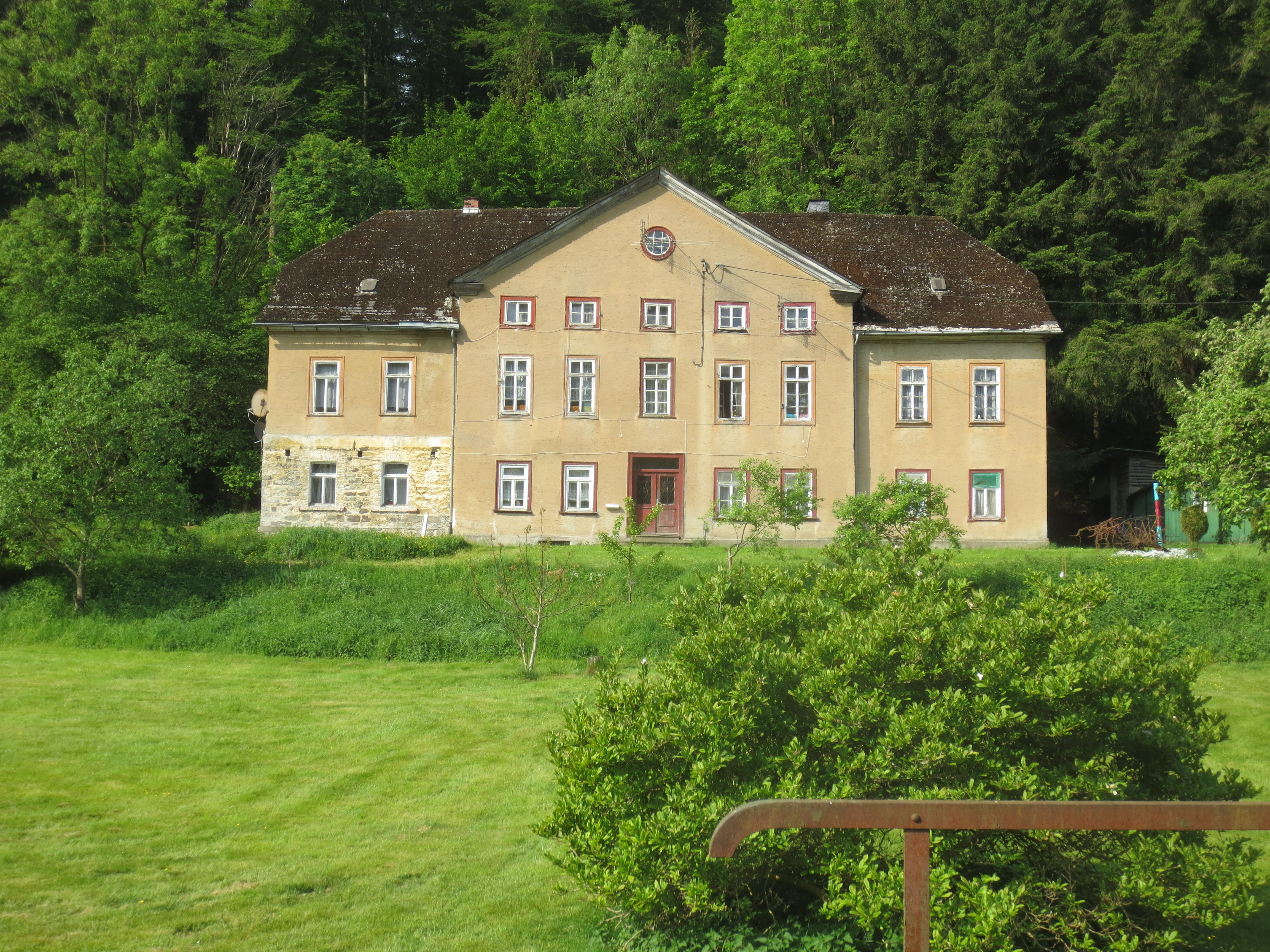 Ehemaliges Domänengebäude auf dem Friedrichshammer, Gemeinde Kunst Wittgenstein, jetzt Bad Laasphe, Baujahr ca. 1820, Aufnahme 2018